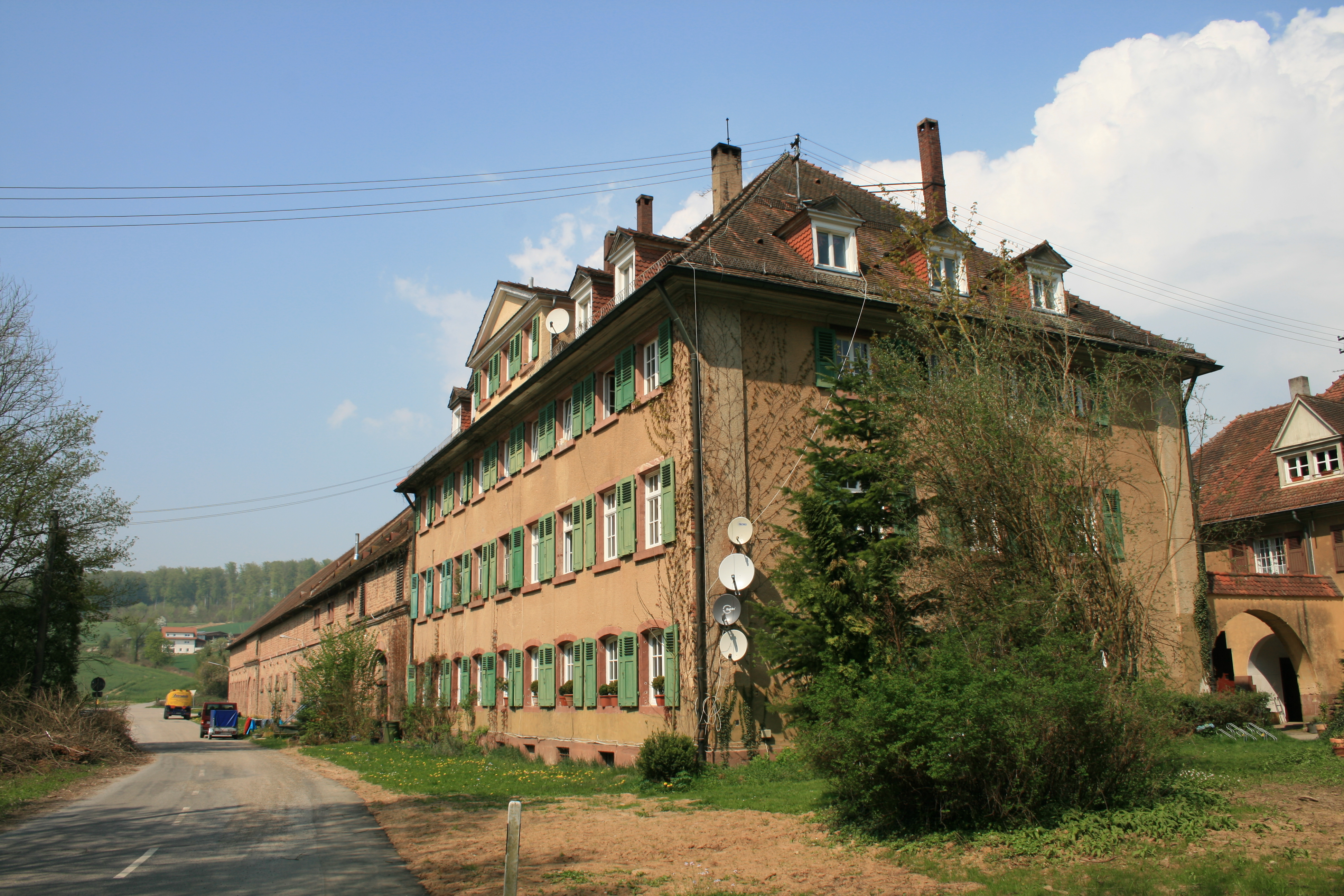 Langenzell, Gemeinde Wiesenbach (Baden)